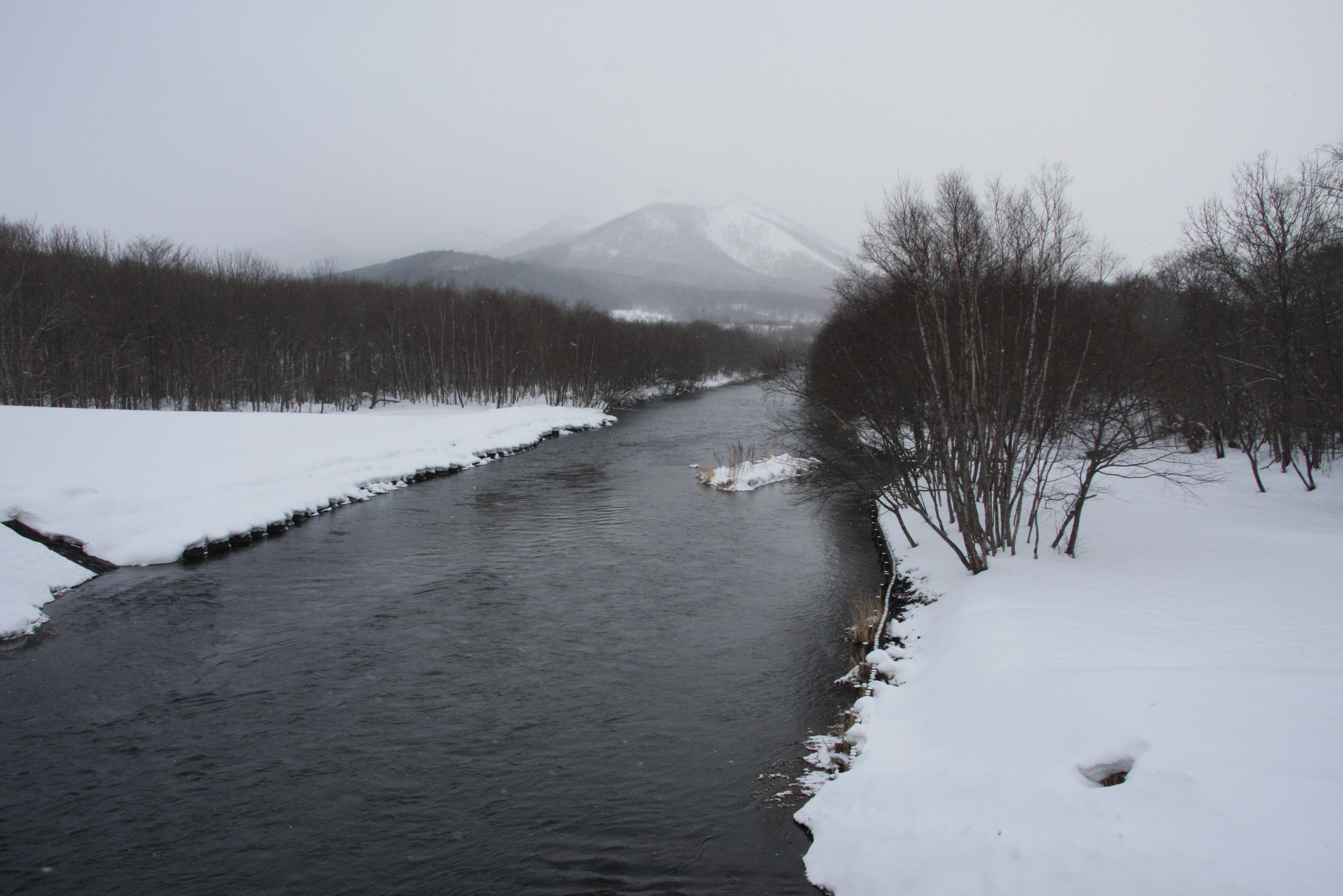 釧路湿原を貫流する新釧路川